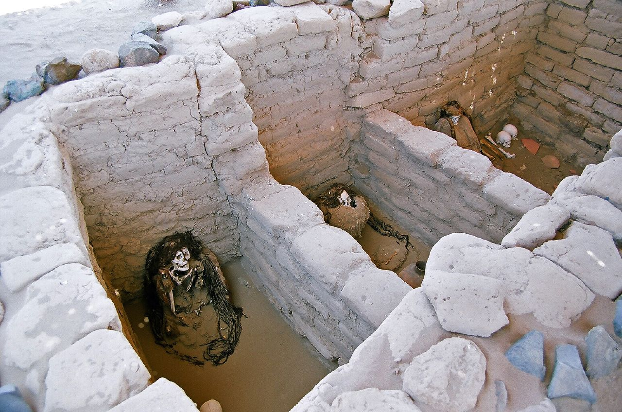 Nazca mummy